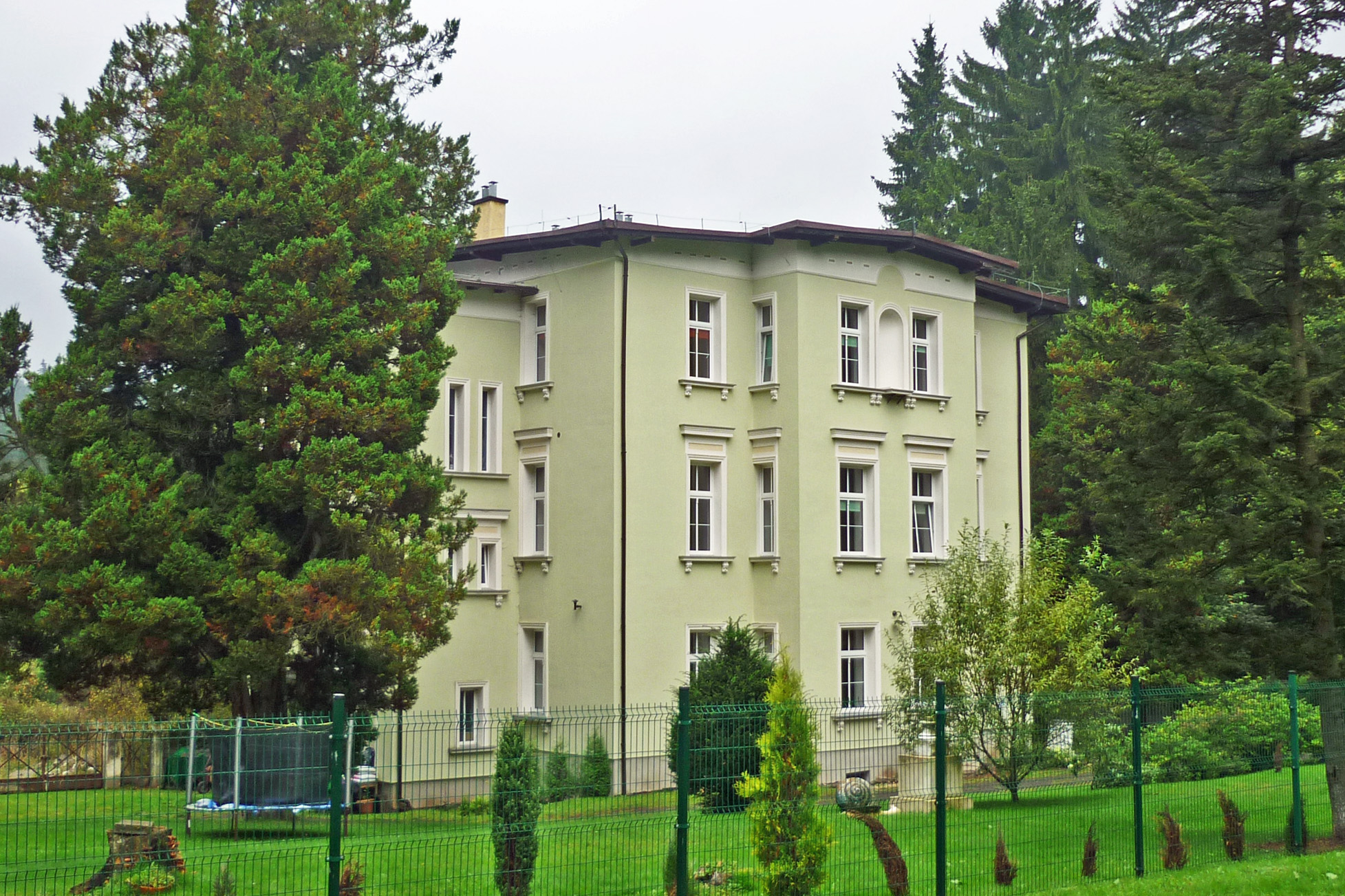 Sokołowsko, ul. Parkowa 4 - pierwotnie Villa Elsa (willa rodziny dyrektora sanatorium), po II wś przedszkole, od 2000 r. "Domu św. Elżbiety" (własnośċ Prawosławnej Parafii św. Archanioła Michała).